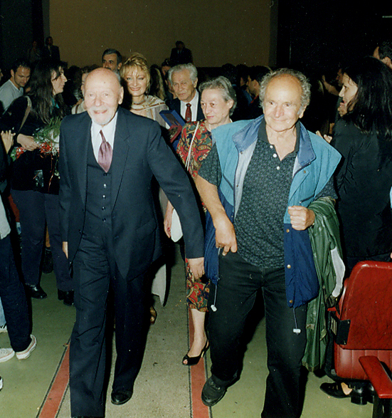 Mića Tomić i Bata Paskaljević na Filmskim susretima u Nišu 1997. godine